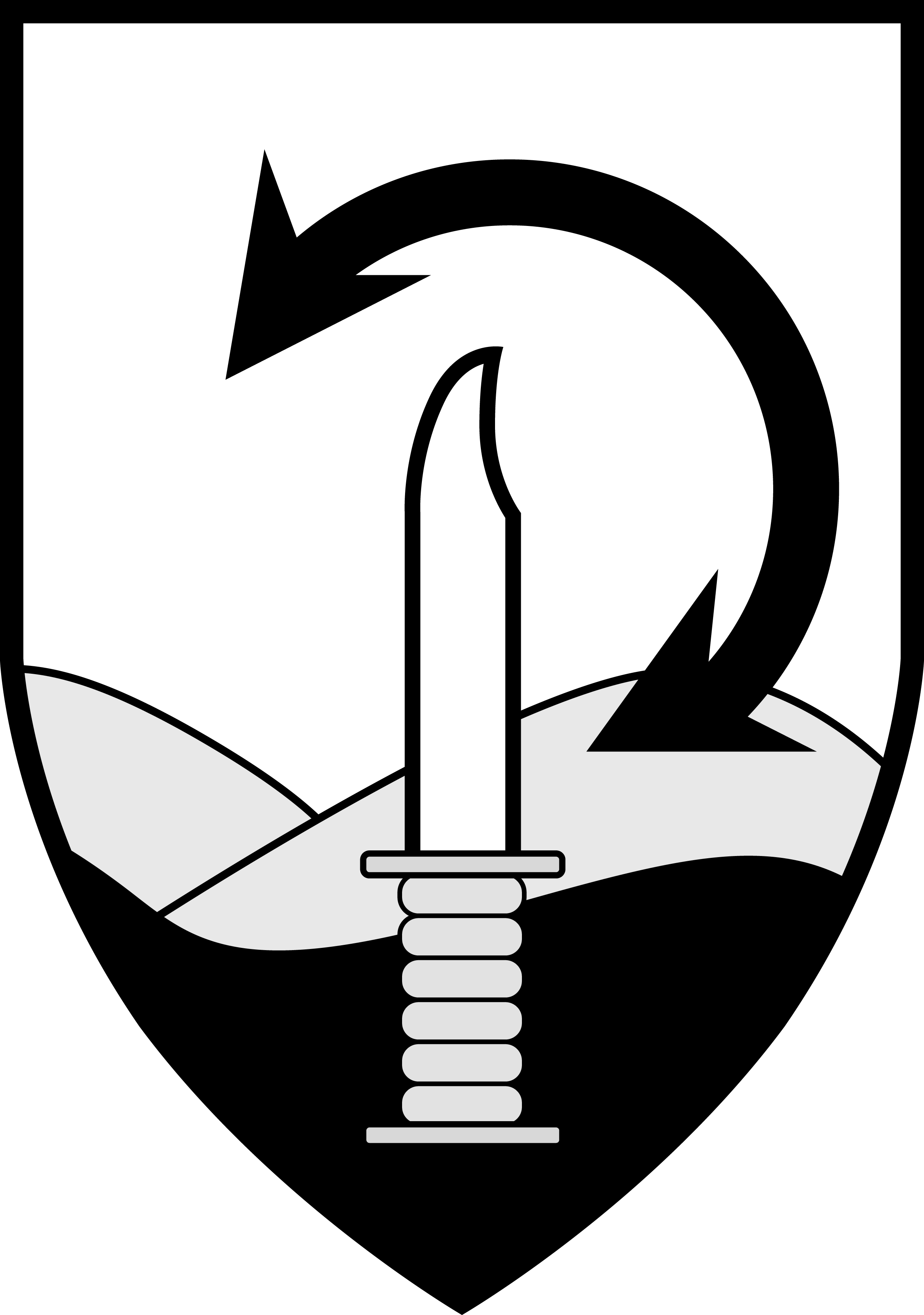 תג חטיבת עוז שבה מוצבת יחידת מגלן.